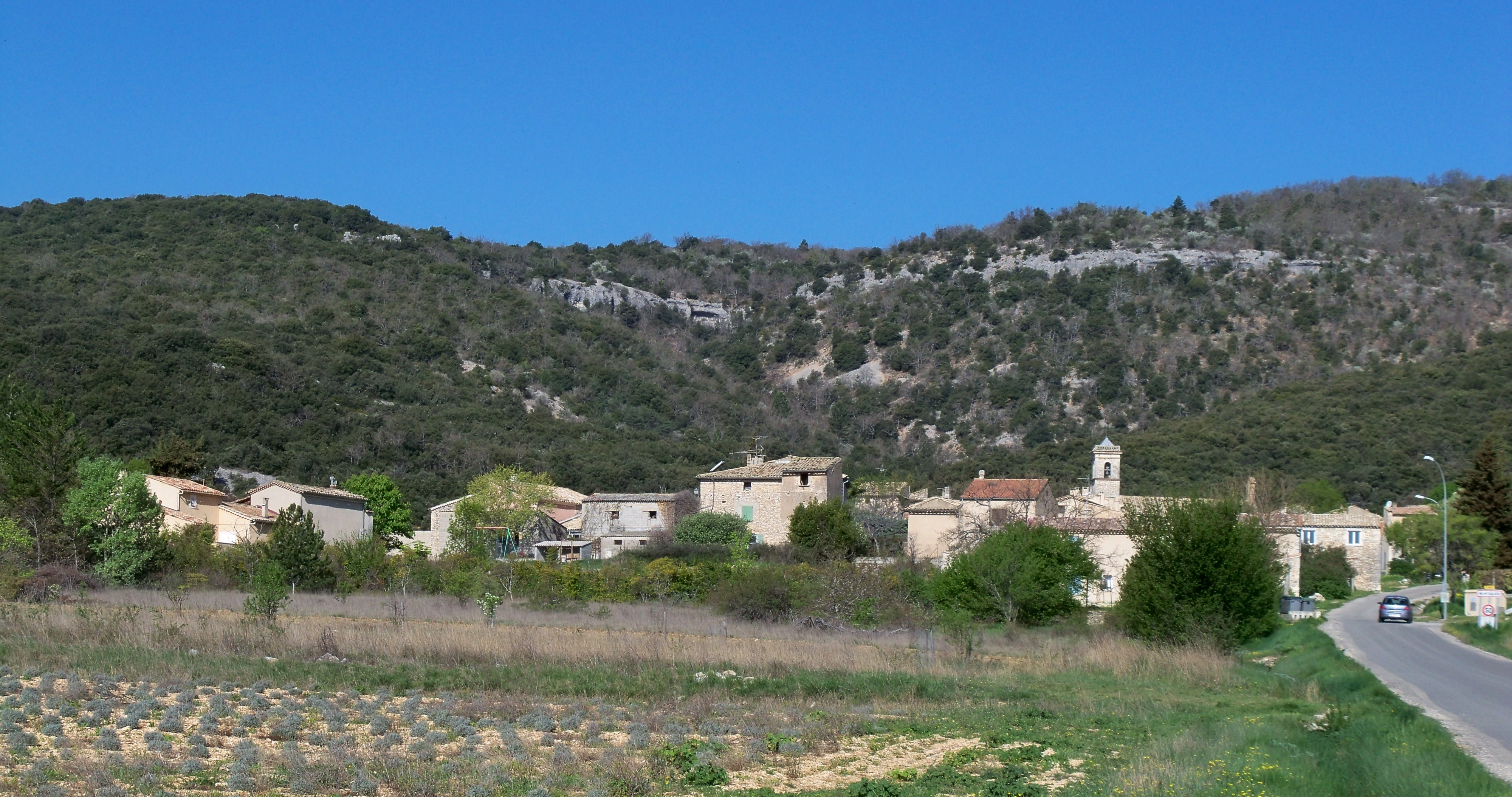 vue sur le village de Montsalier (04)